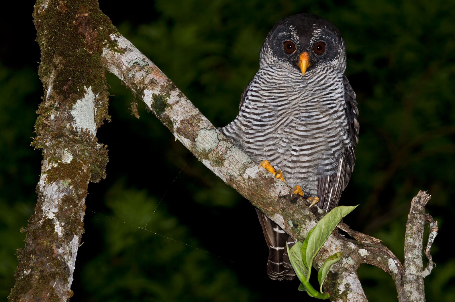 Bijagua, Costa Rica